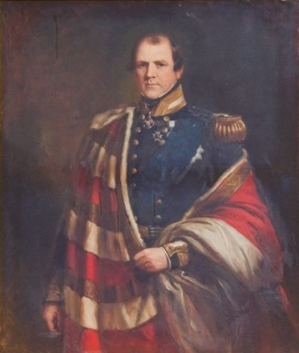 «Портрет графа Фредерика Спенсера (1798—1857), рыцаря ордена Подвязки»Portrait of Frederick Spencer, 4th Earl Spencer (1798-1857)